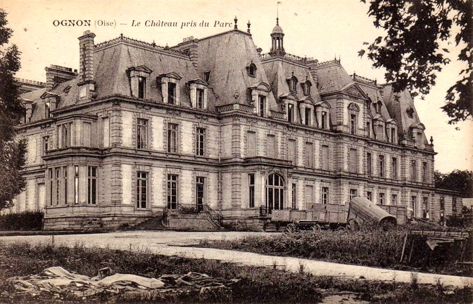 La façade est du château sur le parc, vraisemblablement pendant les travaux de remise en état peu après la Première Guerre mondiale, quand le domaine avait accueilli un grand hôpital de la Croix-Rouge, avec cinquante baraques disseminées dans le parc.